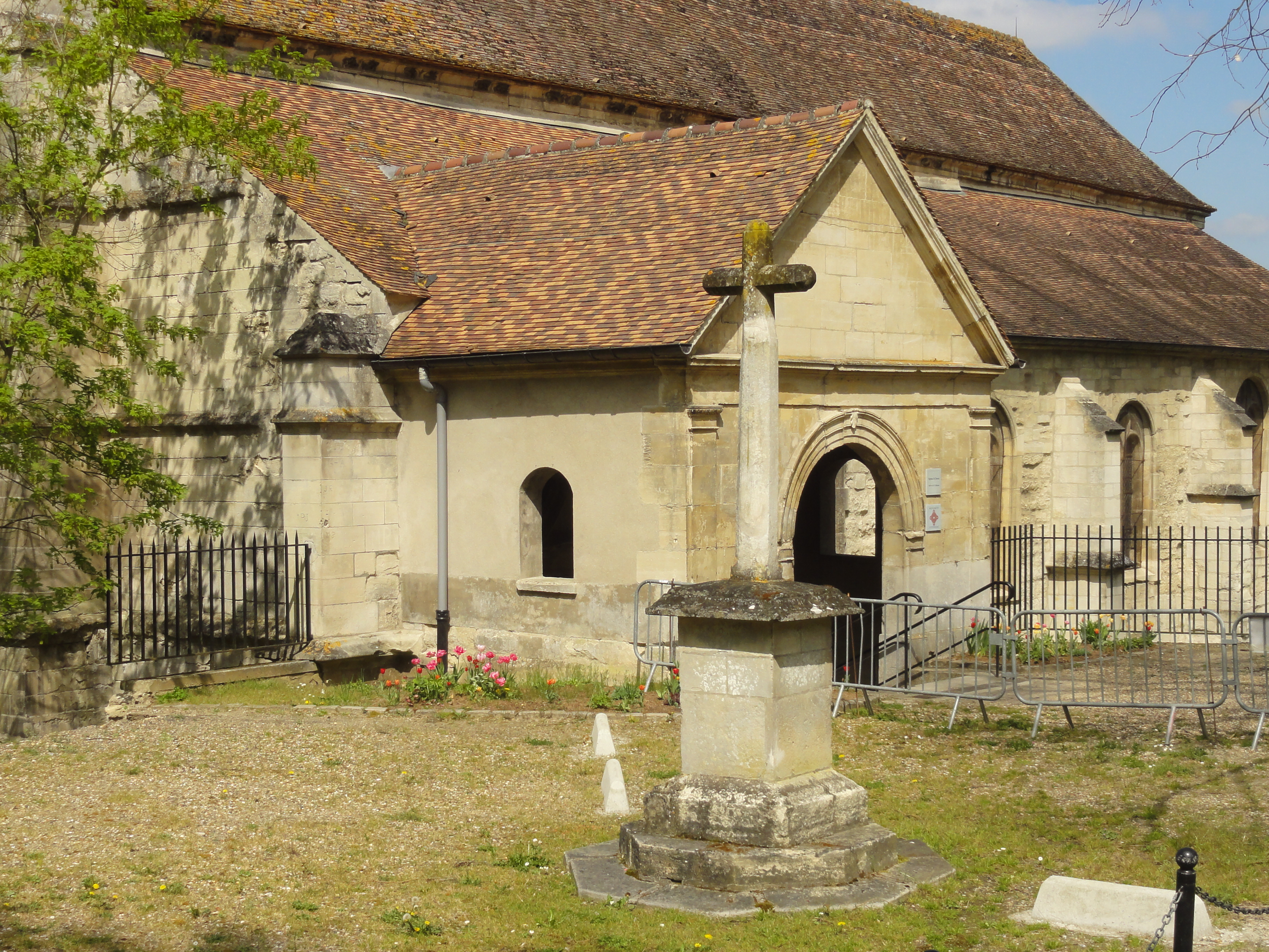 Église Saint-Denis de Méry-sur-Oise - voir titre.